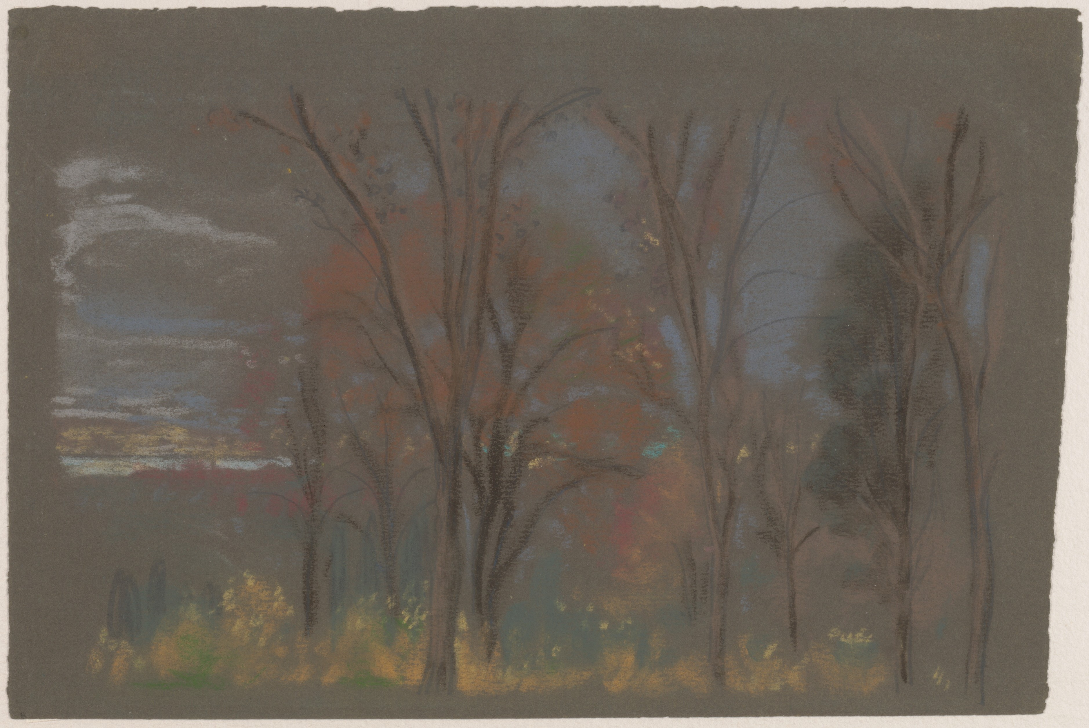 Drawing; Drawings